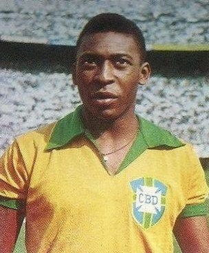 Pelé (1966), 'Campioni dello Sport 1966 - 1967', Panini figurina n°168.